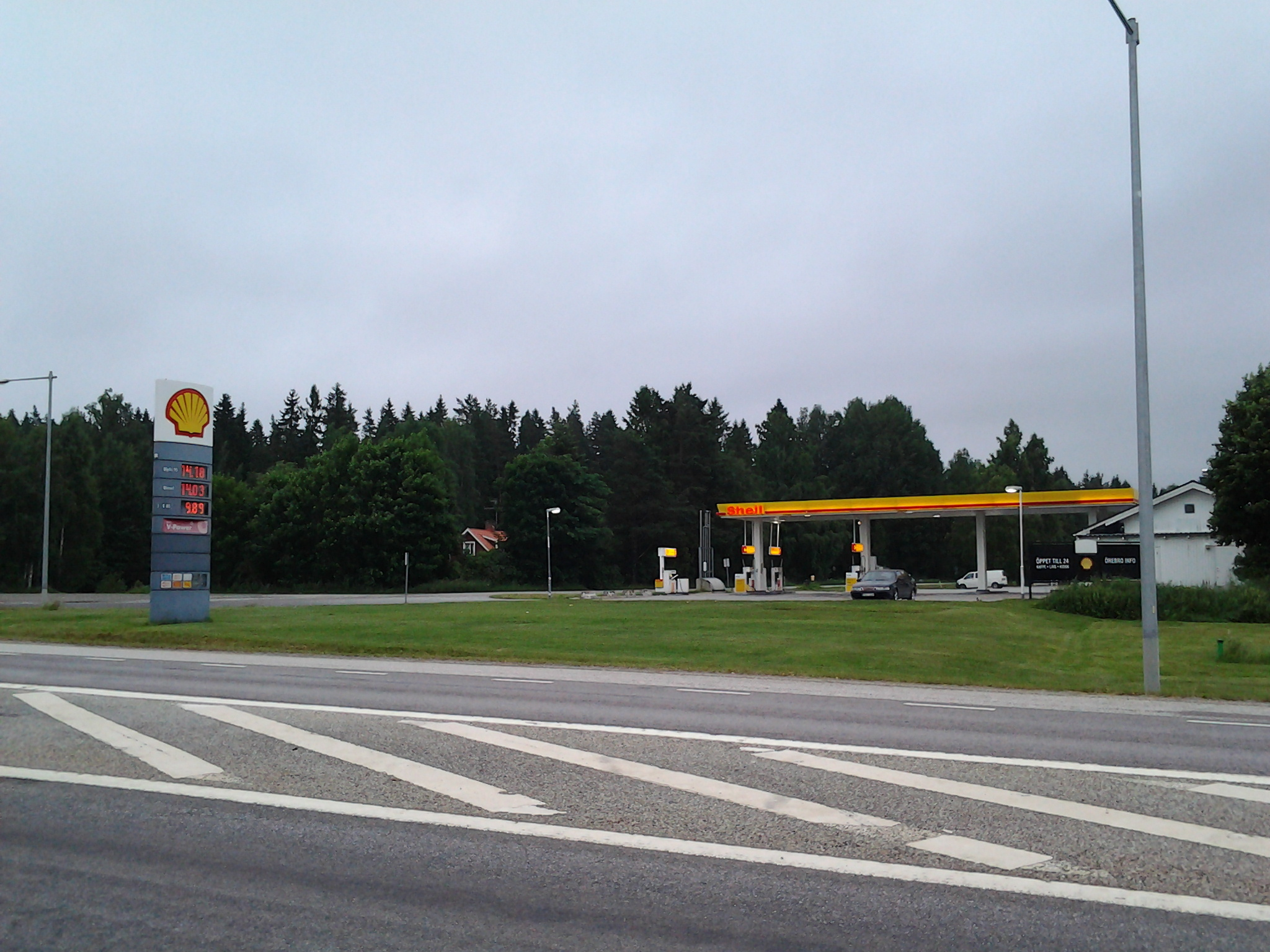 Bensinstationen "Sanna Kroa" längs länsväg T 691 i Örebro län, före detta E18.